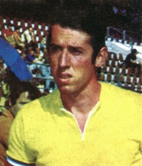 Daniel Morelon (1972), 'Sprint 72', Panini figurina n°79.